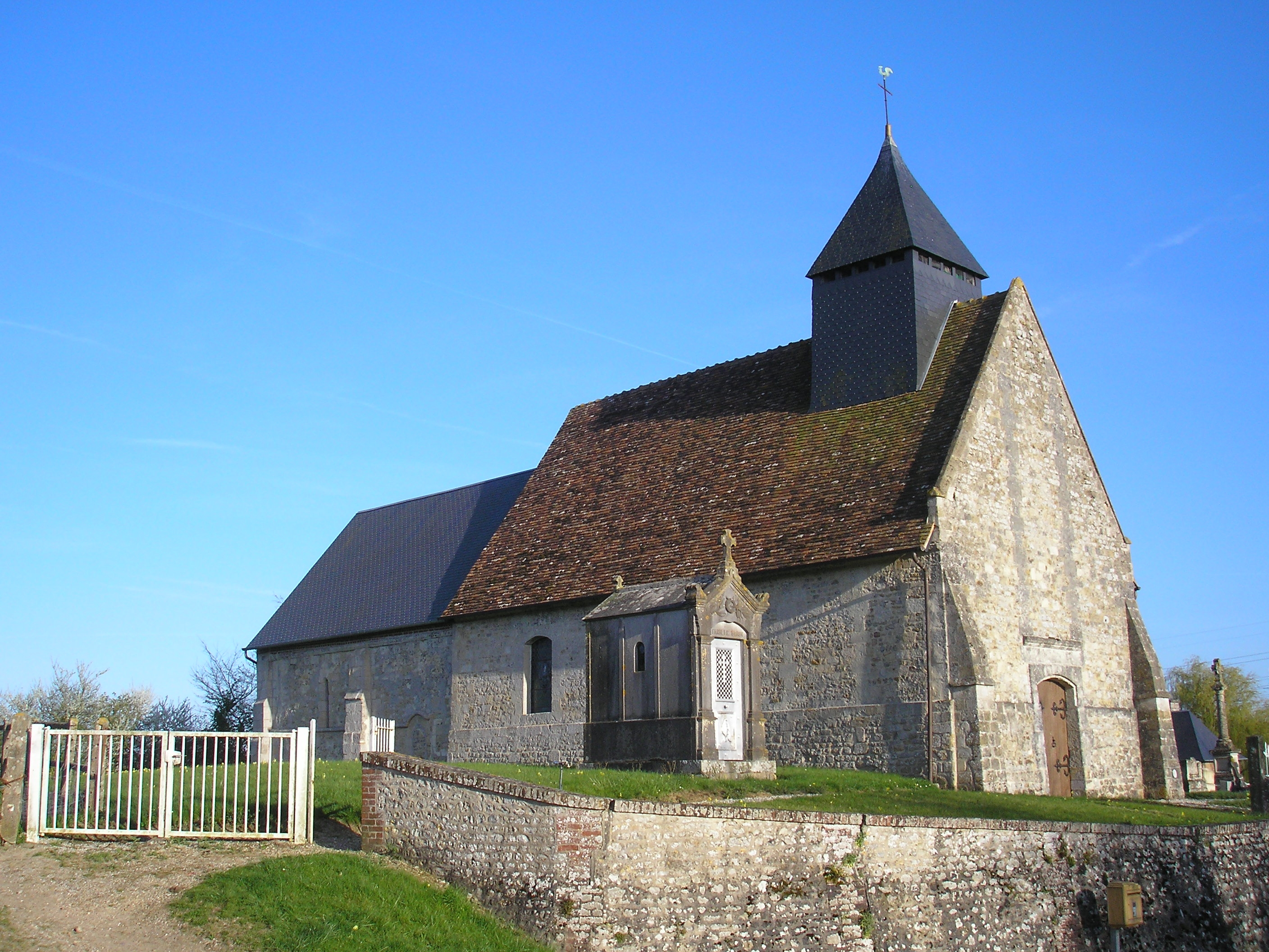 Gerrots (Normandie, France). L'église Saint-Martin.